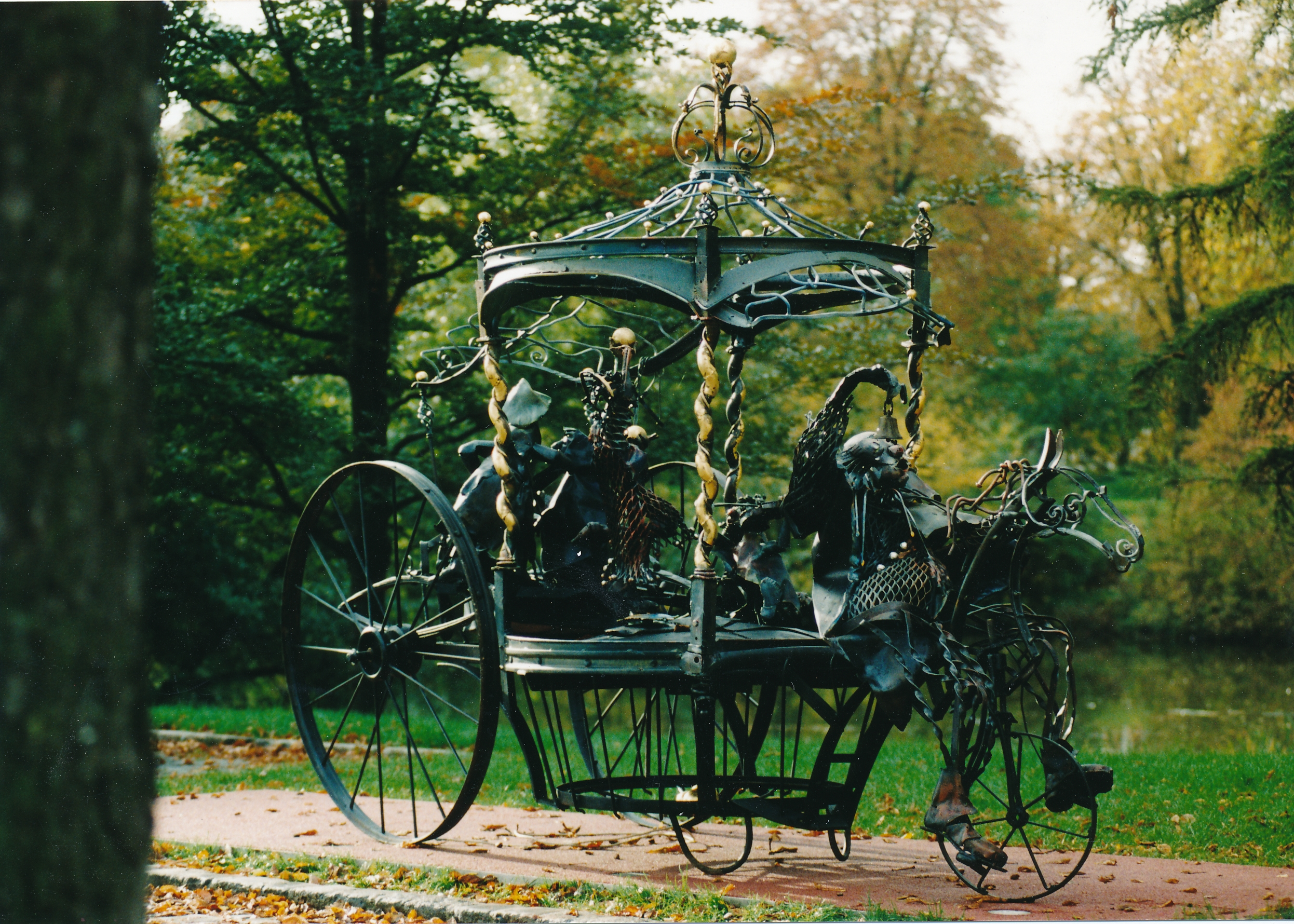 Alteisen Kunstwerk "Puppenspieler-Kutsch" gefertigt im jahre 1998 von Otto Potsch.